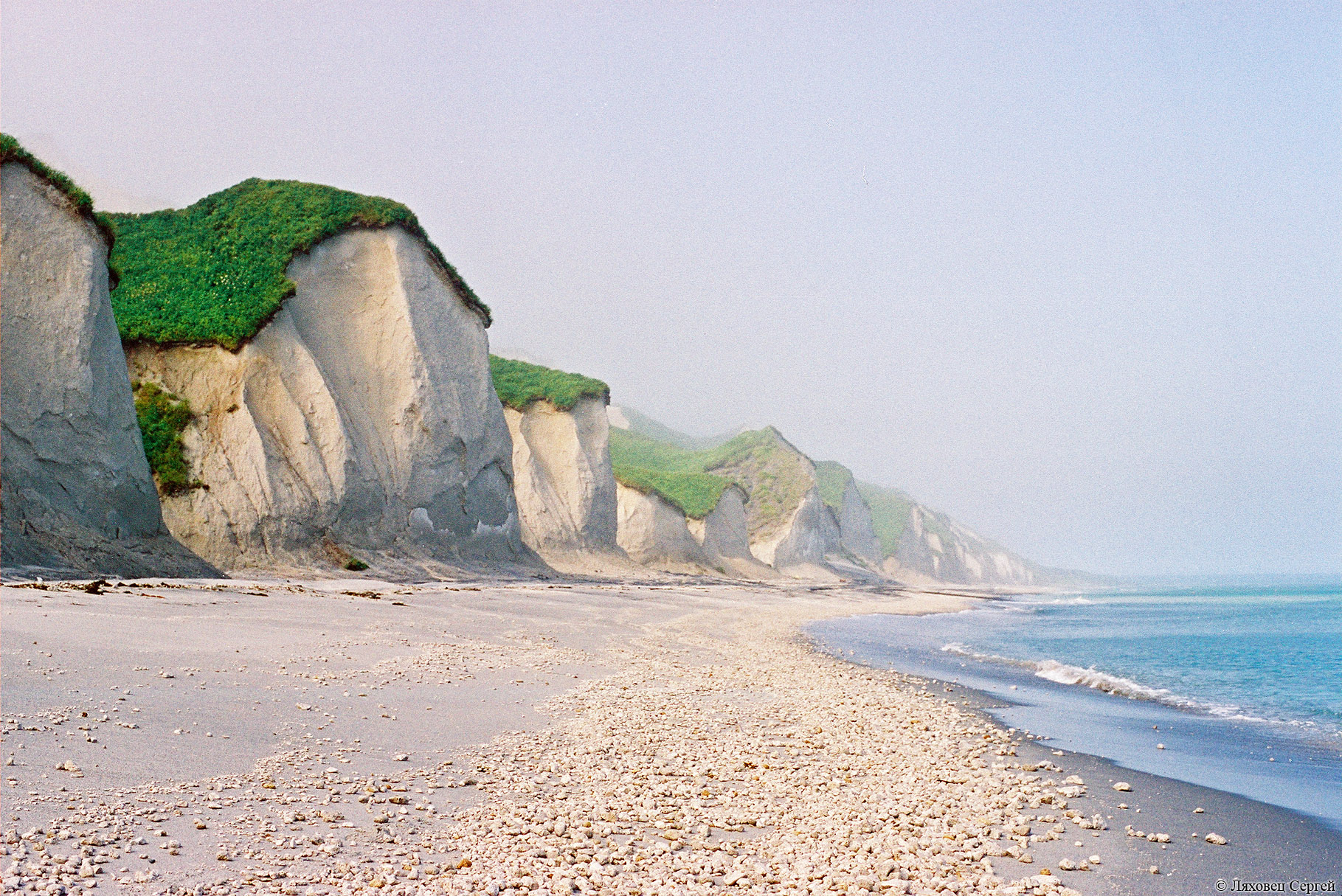 Белые скалы: Большая Курильская гряда, северная часть о. Итуруп, район Ветрового перешейка,Курильский городской округ, Сахалинская область This image is related to the protected area of Russia number 6520036